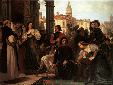 Une famille noble devant le conseil des troubles